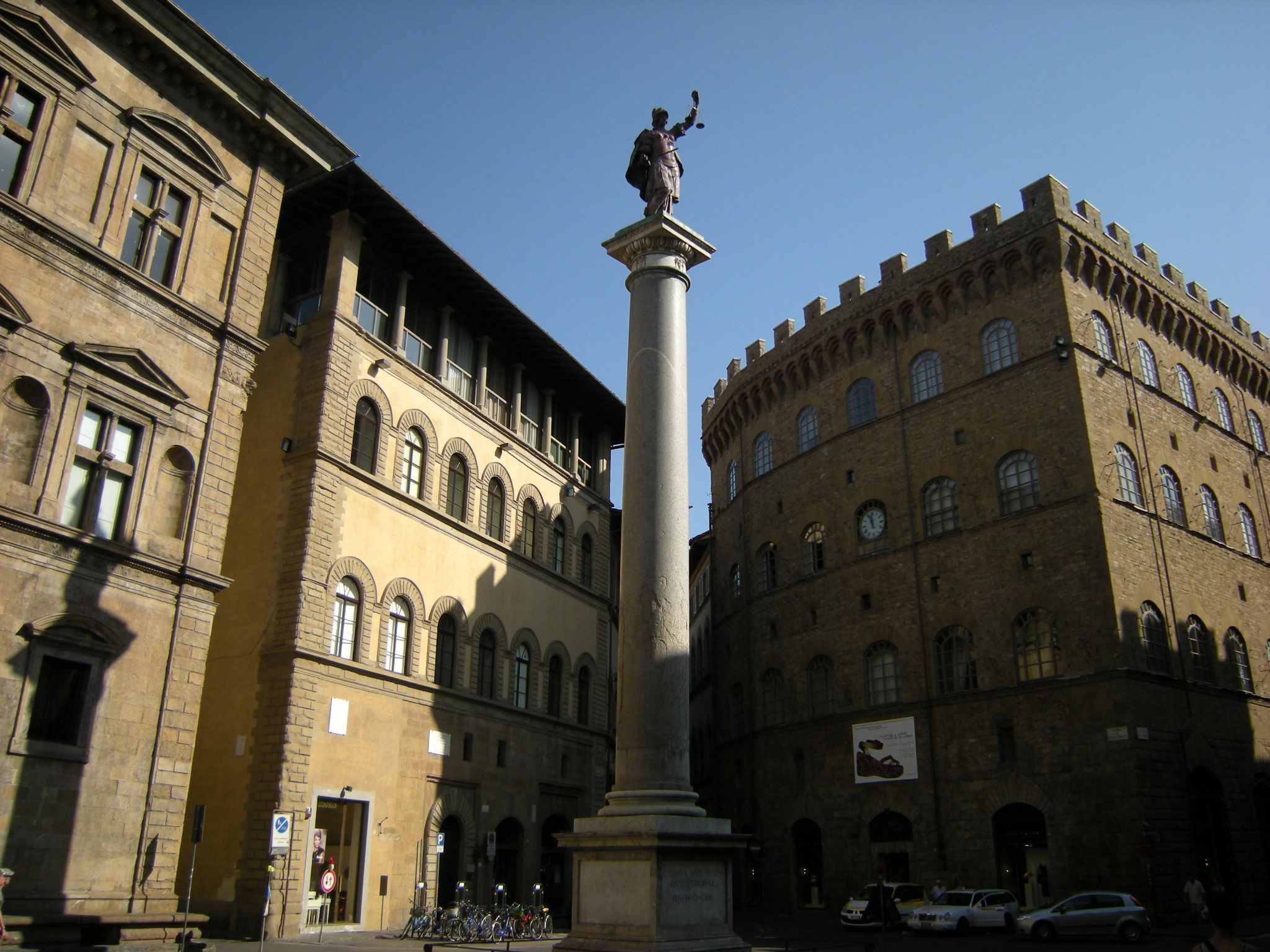 Florença, Itália